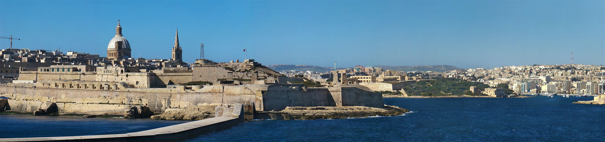 Malti: Valletta, Malta.